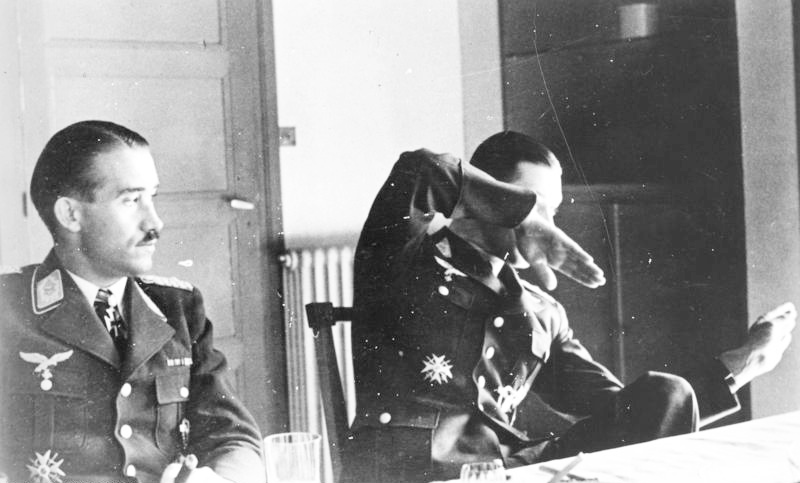 Werner Mölders und Adolf Galland Die beiden erfolgreichsten Jagdflieger, Oberstleutnant Galland und Oberstleutnant Mölders, nach ihren letzten Luftsiegen. Oberstleutnant Mölders gibt seine Kameraden eine Schilderung des Kampfverlaufes. PK - Aufnahme: Kriegsberichter Dreesen Abgebildete Personen: Mölders, Werner: Oberst, Ritterkreuz (RK), Luftwaffe, Deutschland (GND 11858300X) Galland, Adolf: Generalmajor, Inspekteur der Jagdflieger, Ritterkreuz (RK), Luftwaffe, Deutschland (GND 11853727X)